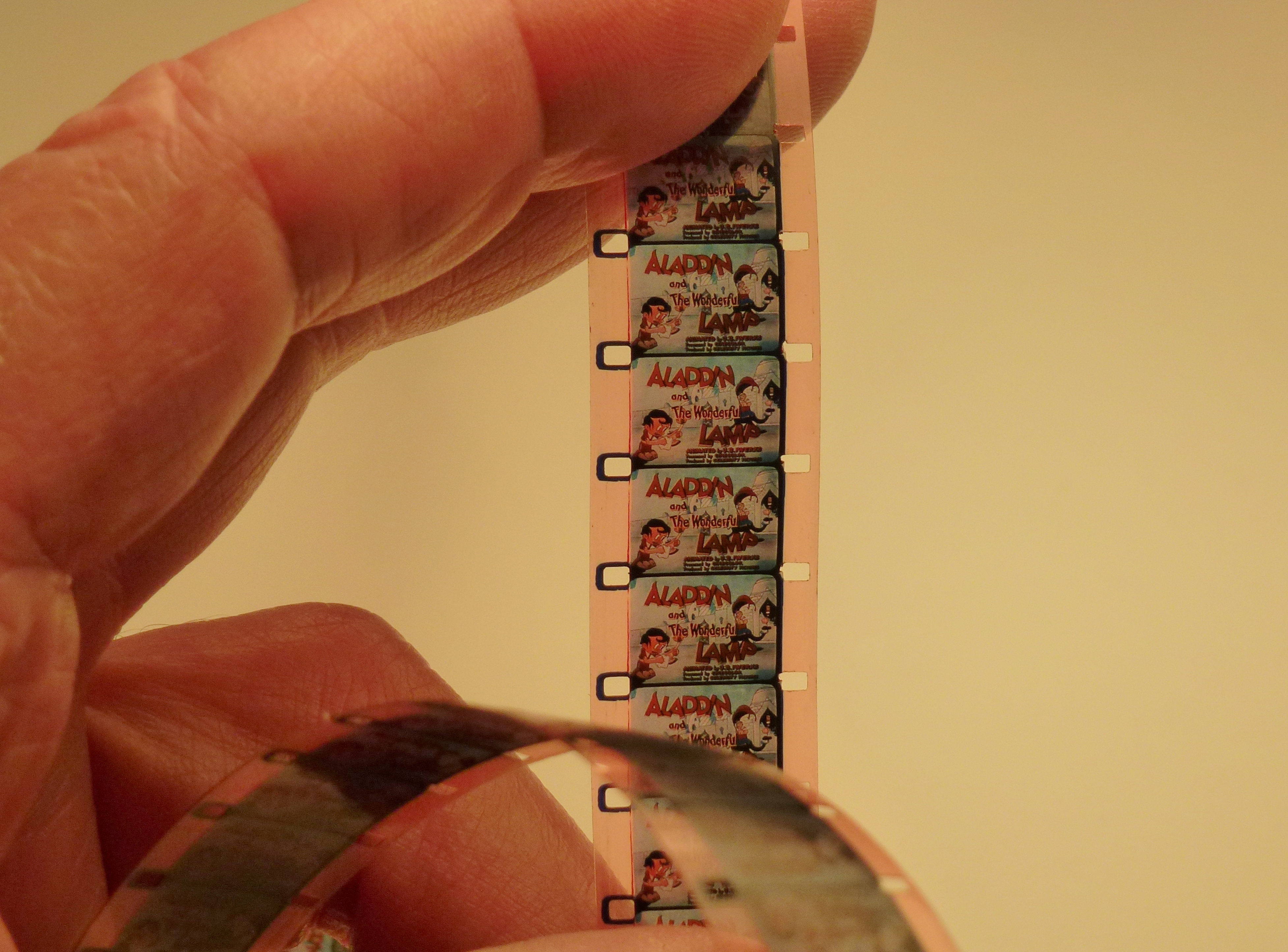 16mm animerad färgfilm i Cinecolor